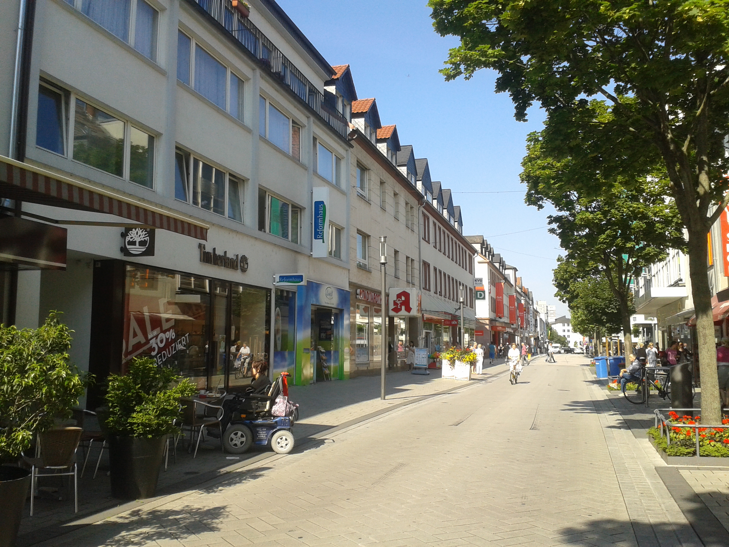 Nürnberger Straße